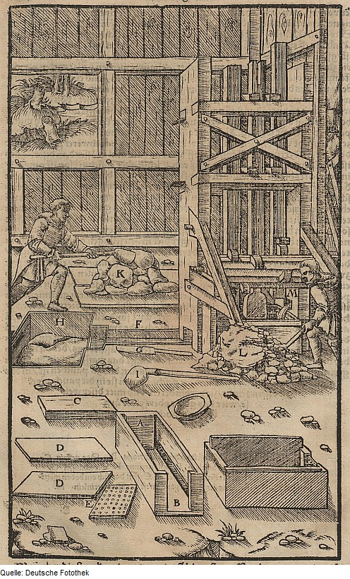 Original image description from the Deutsche Fotothek Bergwerk & Bergbau & Verhüttung & Hüttenwesen & Aufbereitung & Pochwerk (Pochwäsche)